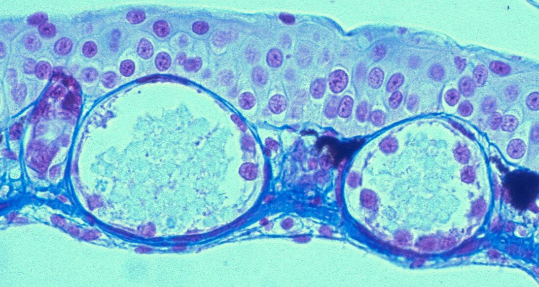 Histologie der Schleimdrüsen des Laubfrosches Lichtmikroskopischer Schnitt durch die Laubfroschhaut. Die rundlich geformten Schleimdrüsen schützen vor Austrocknung indem sie ihren Inhalt an die Hautoberfläche transportieren und auf der Epidermis ablagern. Die rechte Drüse zeigt ansatzweise den Verlauf des Drüsenkanals, der sich nach oben durch die Haut zur Oberfläche schlängelt.